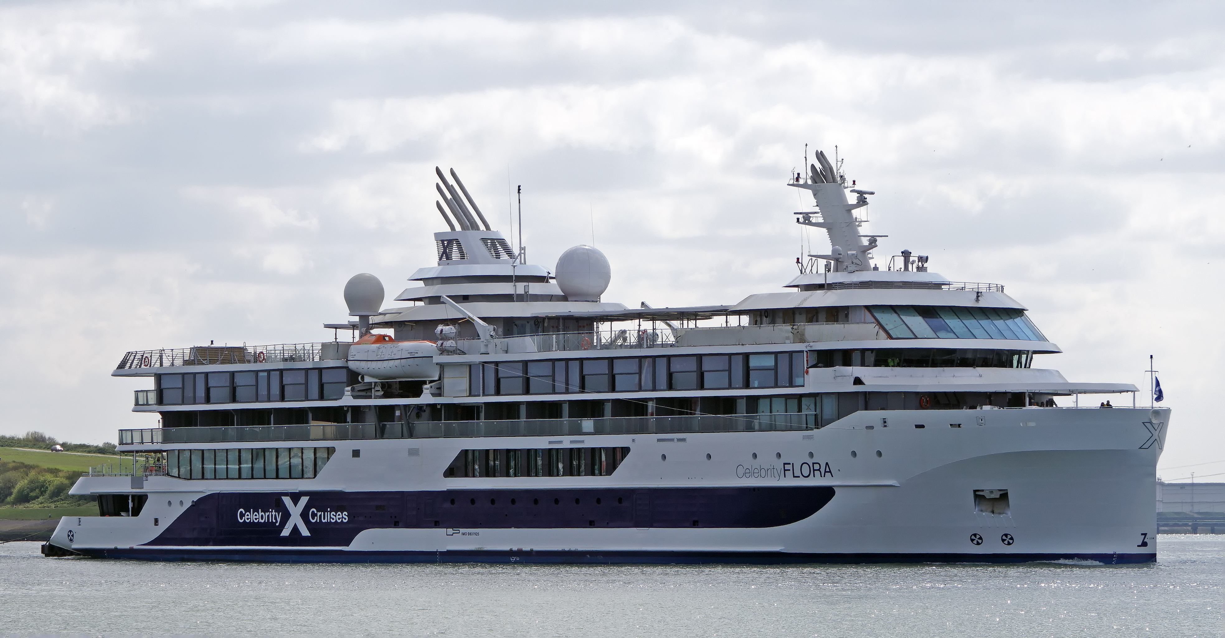 Hoek van Holland 13-4-2019 , het bij Shipyard de Hoop in Lobith gebouwde cruiseschip ging onder begeleiding van de ANNA MARIE en de WALVIS naar de Noordzee voor haar eerste proefvaart.